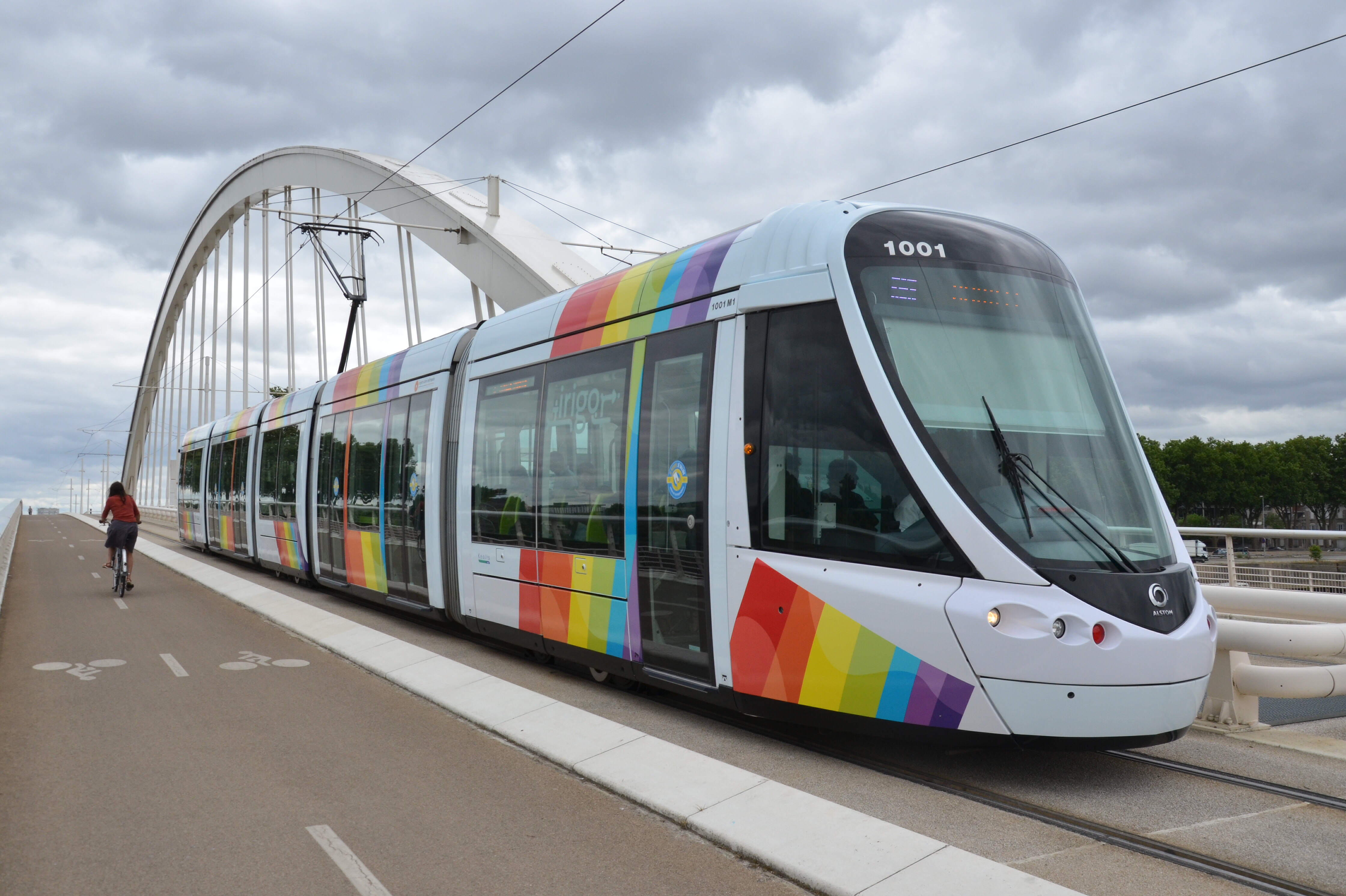 La rame Alstom Citadis 302 n°1001 du réseau Irigo traverse le pont Confluences à Angers, en direction d'Avrillé-Ardenne.